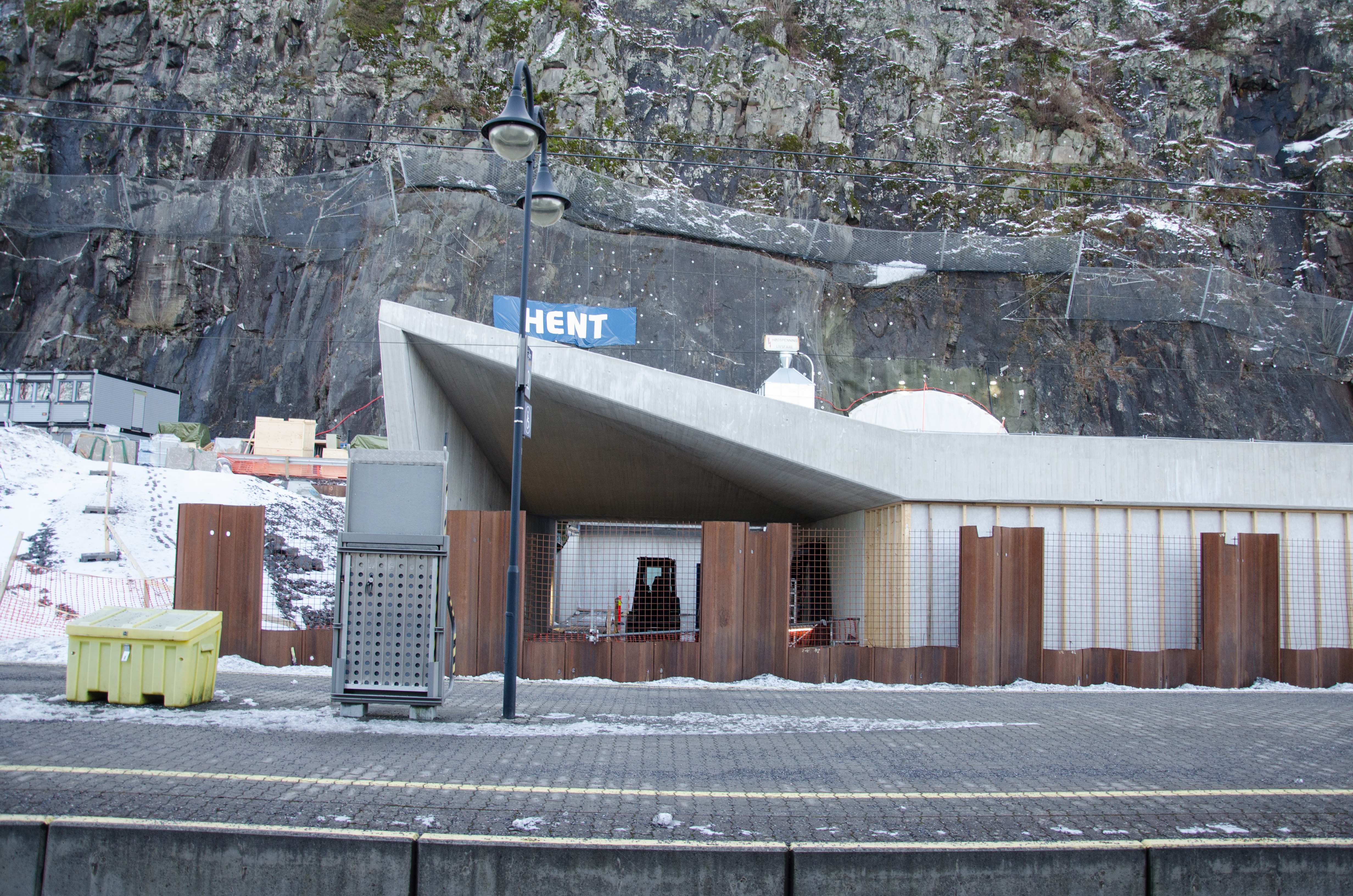 Holmestrand stasjon bygges, februar 2016